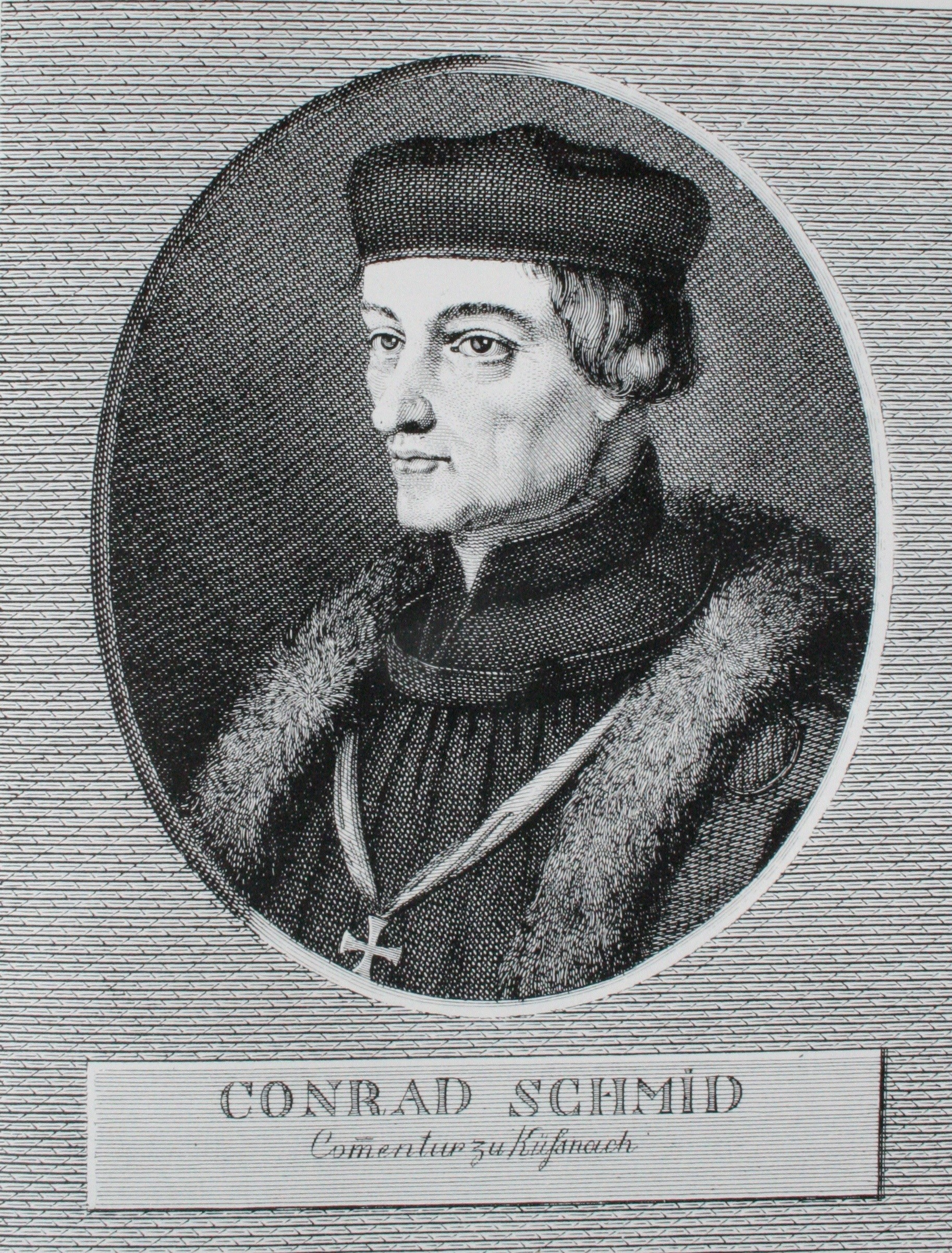 Darstellung des letzten Komturs der Johanniterkomturei Küsnacht Conrad Schmid, erschienen 1825 in einer Lebensbeschreibung von Johann Heinrich Hess, Überarbeitung einer nicht authentischen Darstellung aus dem Meiss'schen Geschlechterbuch. GSZB Zürich